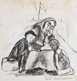 Rachel Szalit-Marcus: Menshelakh un stsenes : zekhtsen tseykhenungen tsu Sholem Aleykhems verk "Motl Peysi dem hazens yingel" Berlin 1922